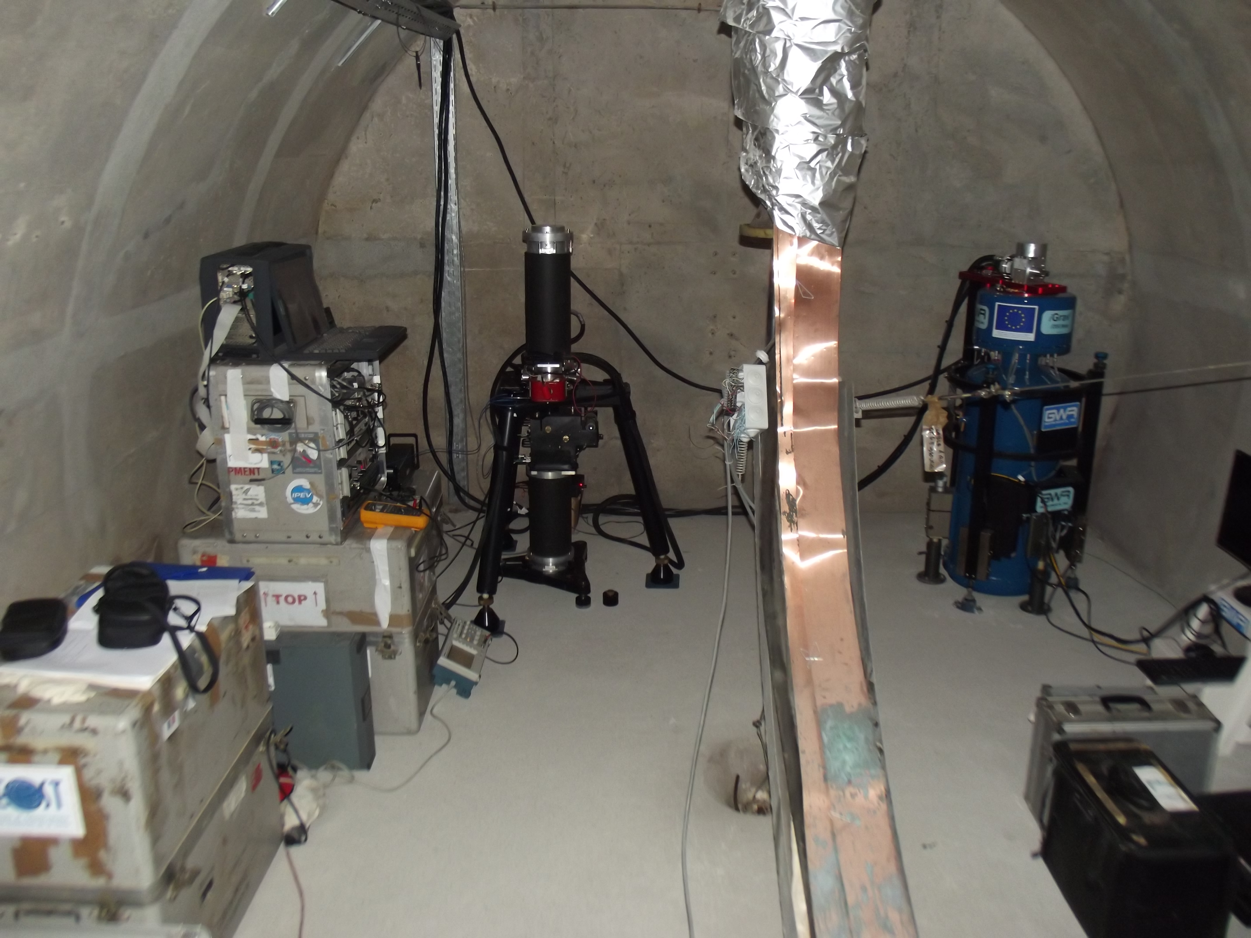 gravi rameau